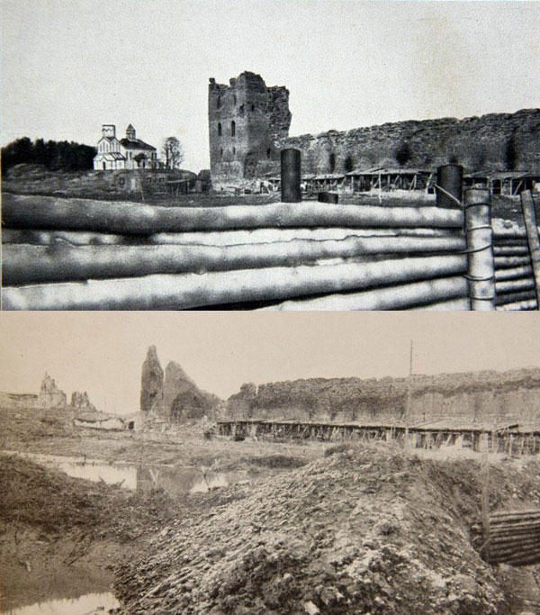 Беларуская (тарашкевіца): Муры Крэўскага замка да і па расстрэле расейскай арміяй